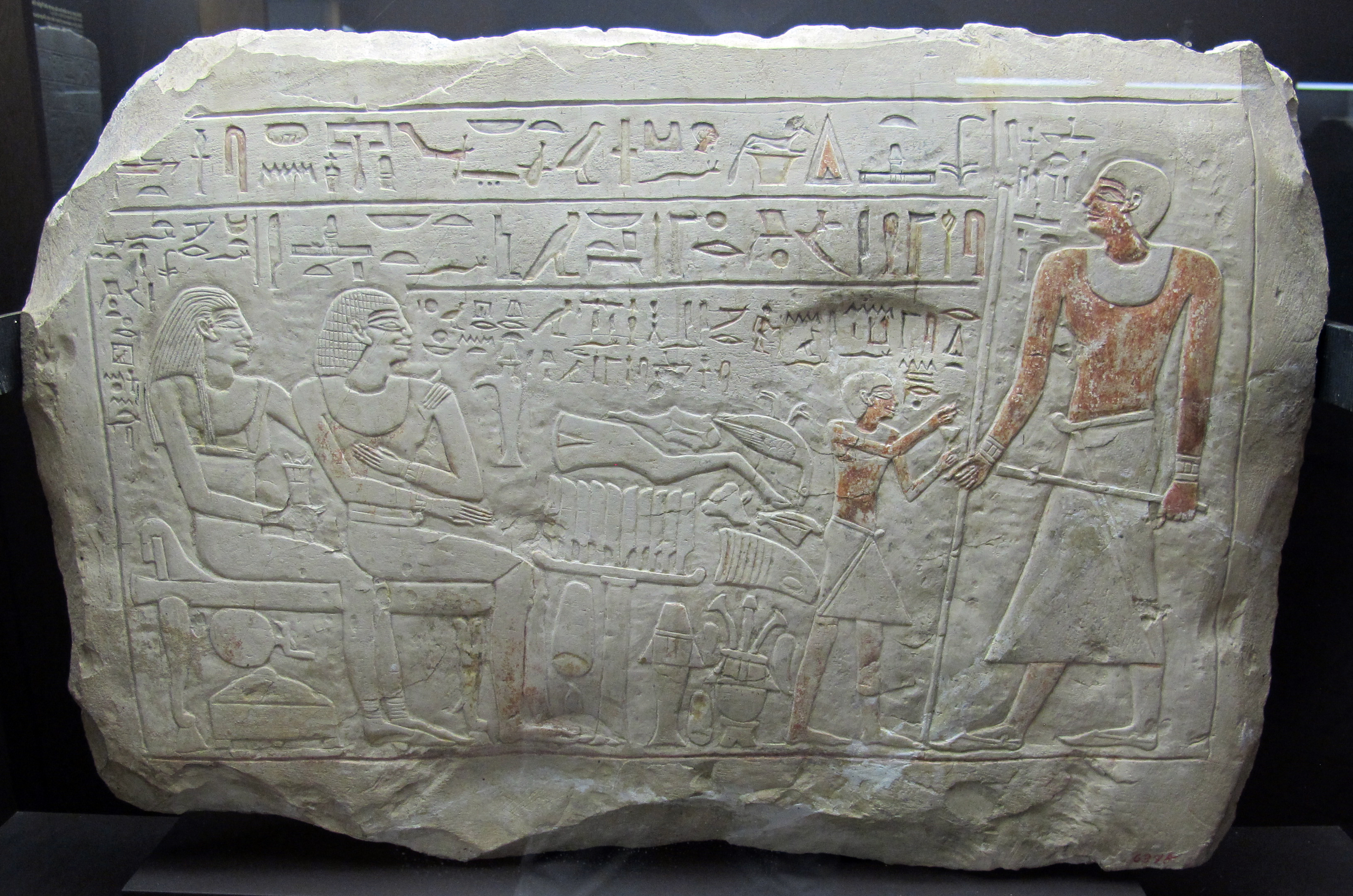 Ancient Egyptian art in the Museo archeologico nazionale (Florence)